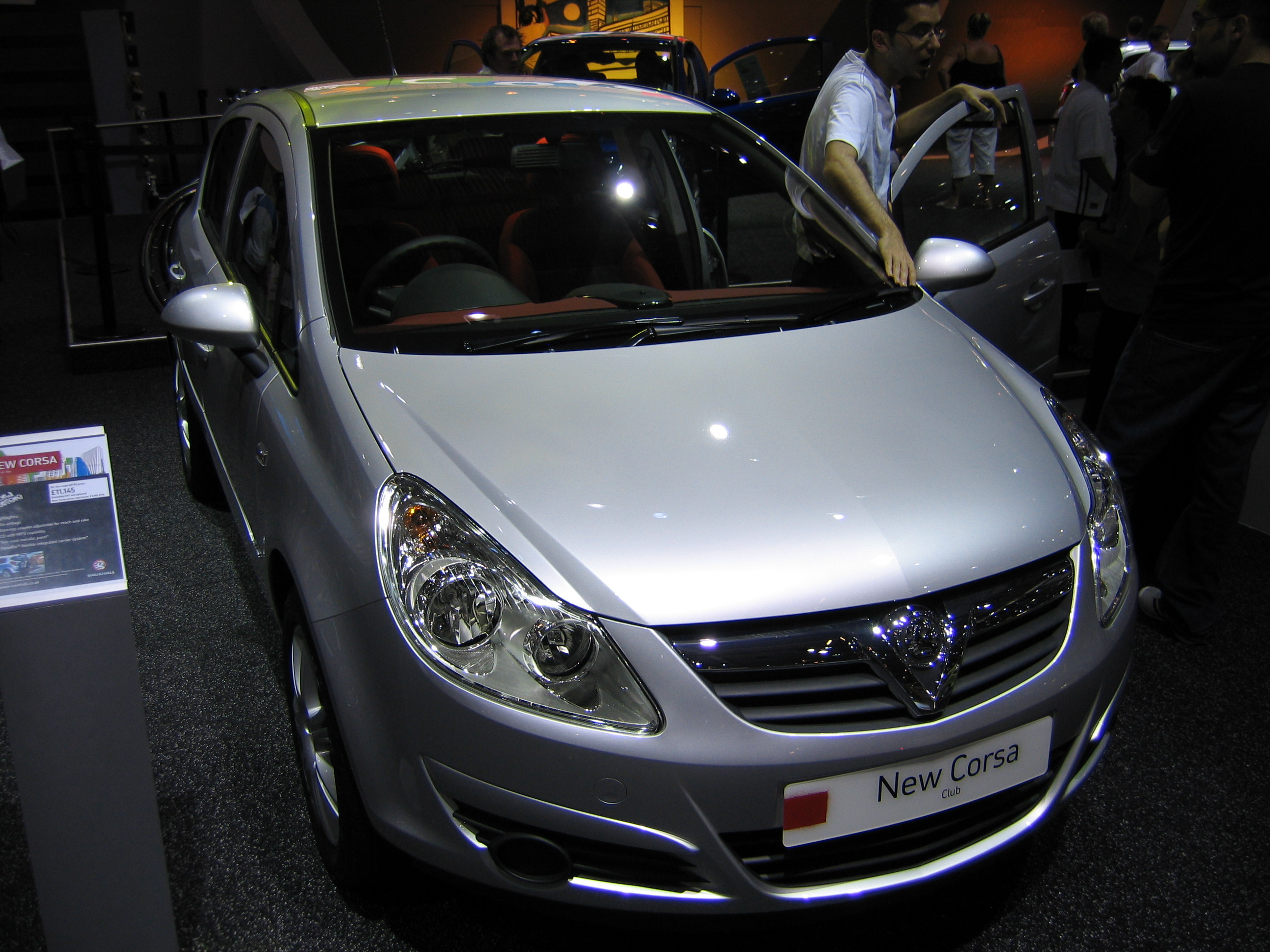 Vauxhall Corsa Club